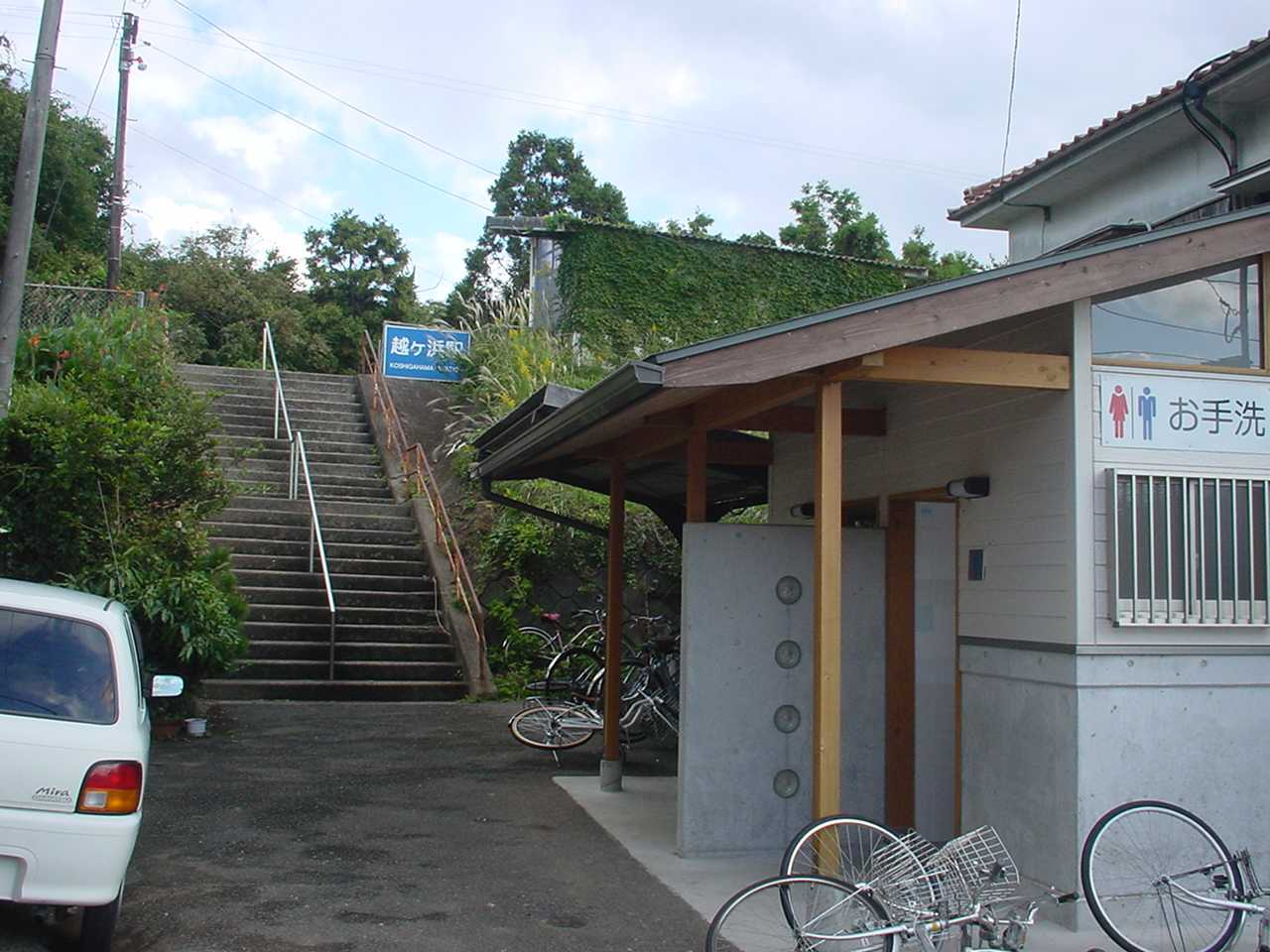 越ヶ浜駅（2005年10月22日投稿者が撮影）